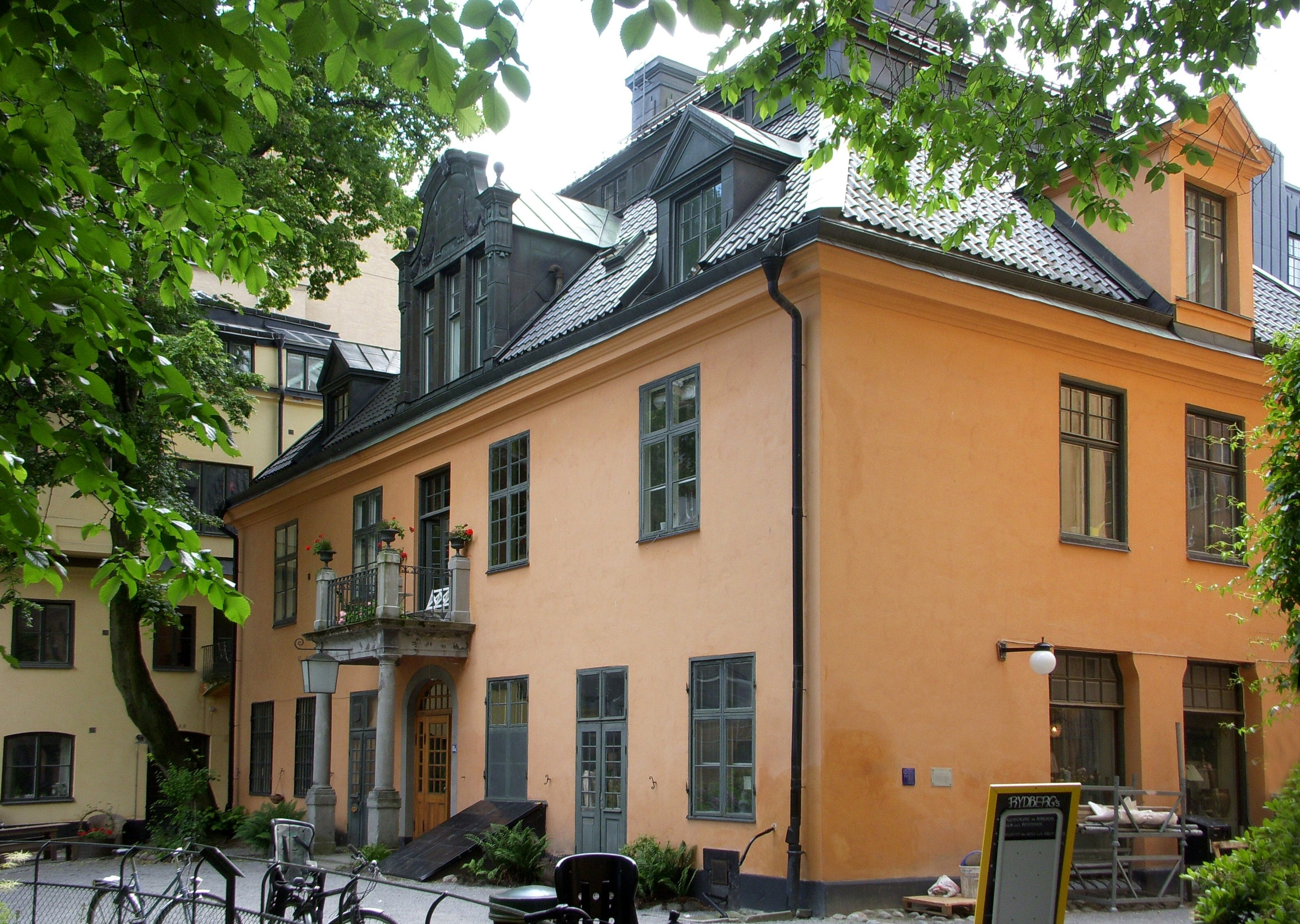 Hårlemanska malmgården vid Centralbadet på Norrmalm, Stockholm